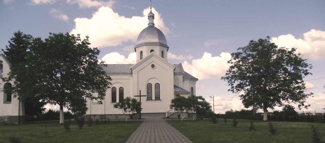 Храм Собору Пресвятої Богородиці.: с. Малехів Жовківського р-ну